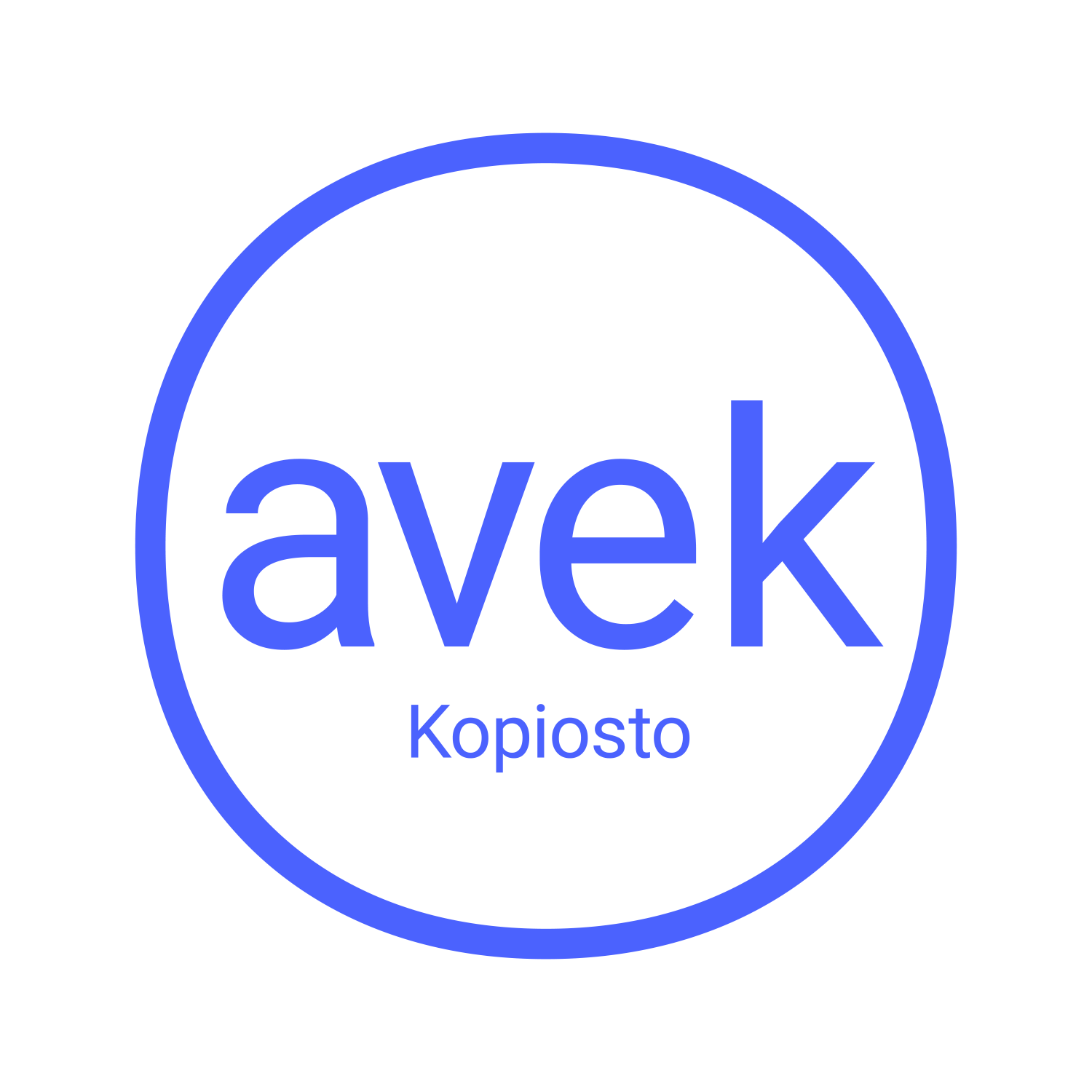 AVEKin logo